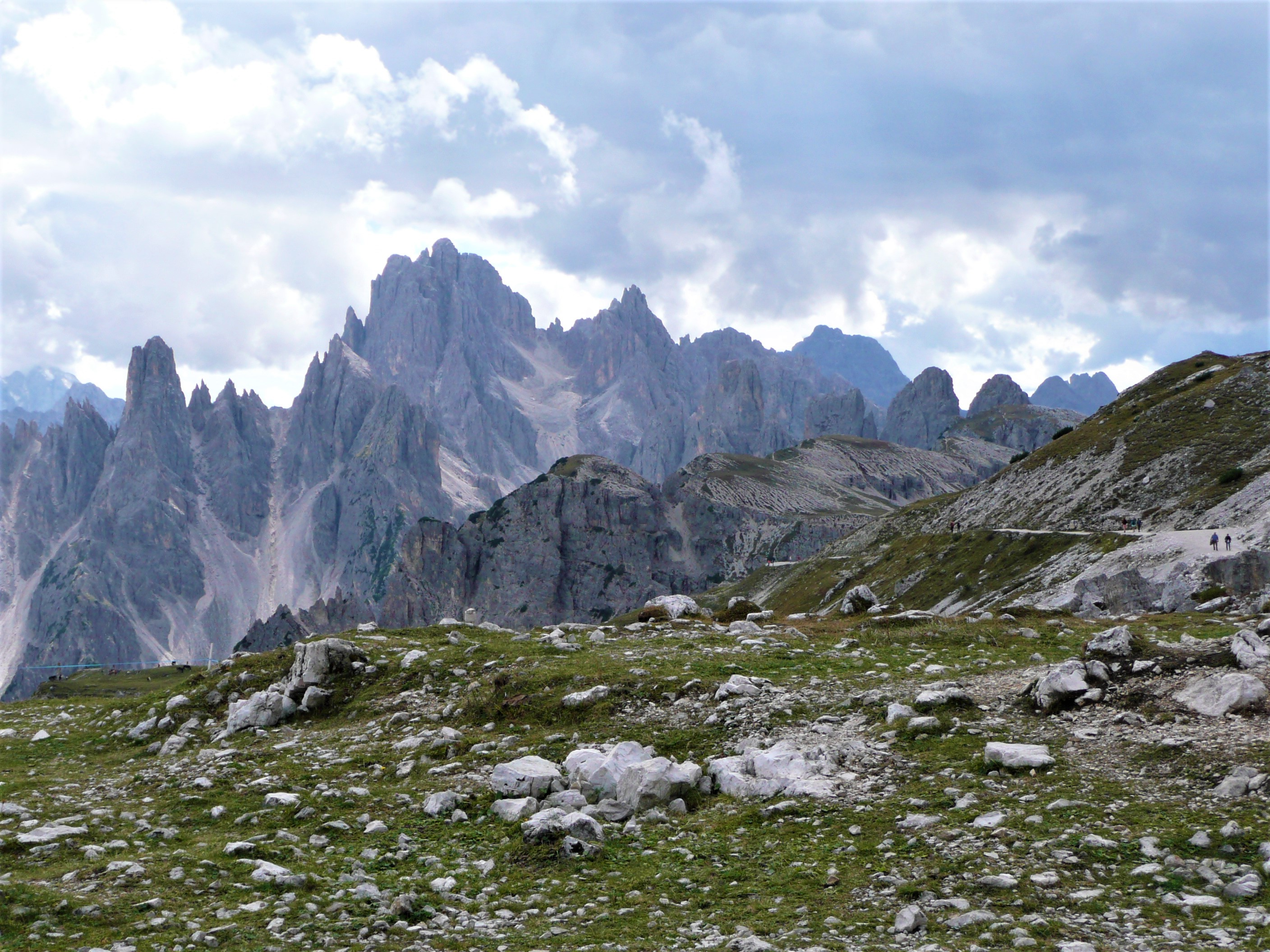 die Cristallo-Gruppe von der Lavaredo-Hütte aus gesehen